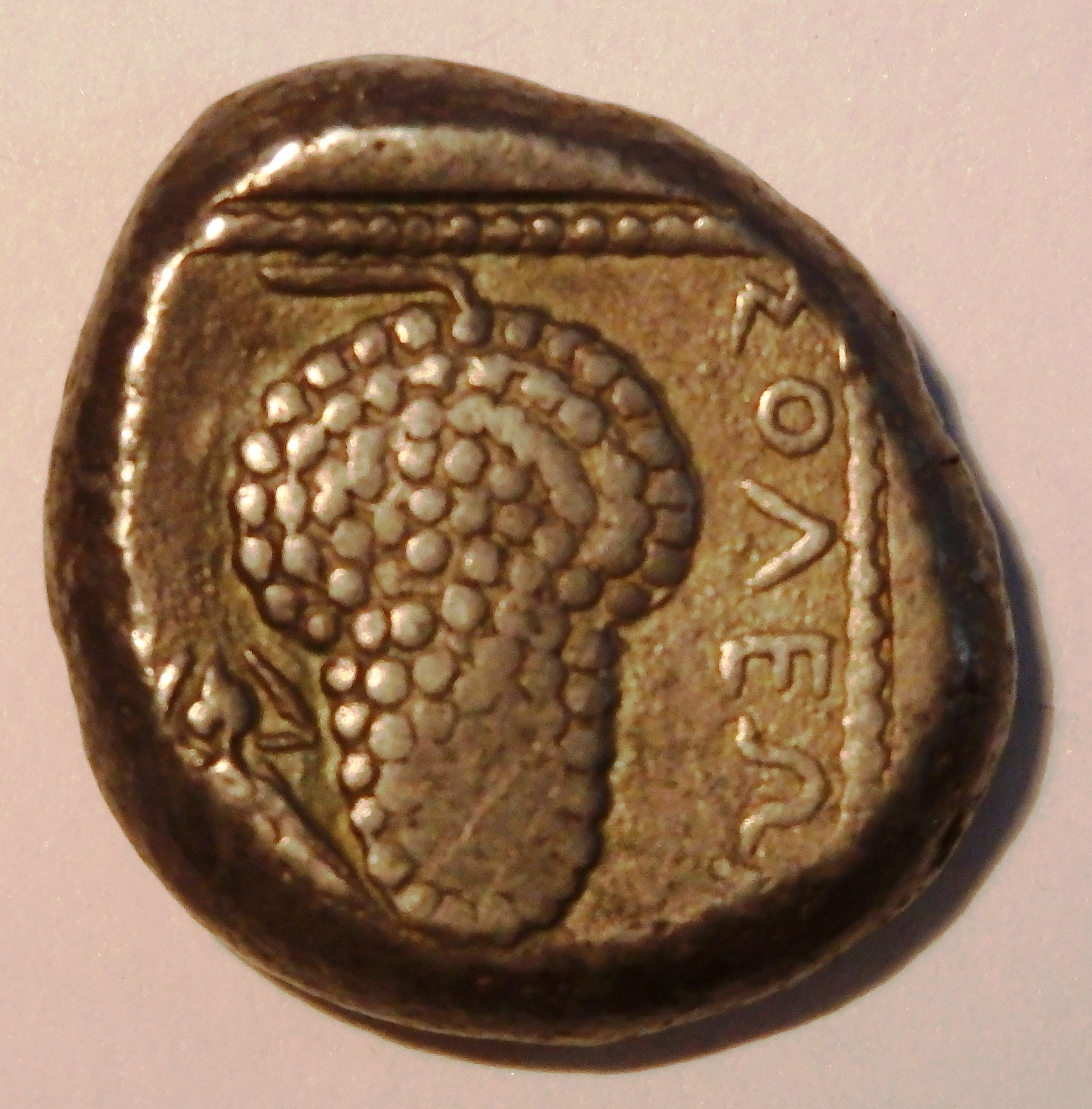 Stater aus Soloi (Kilikia), Traube in Quadratum incusum, ca. 430-390 geprägt, Szaivert/Sear Nr. 5711